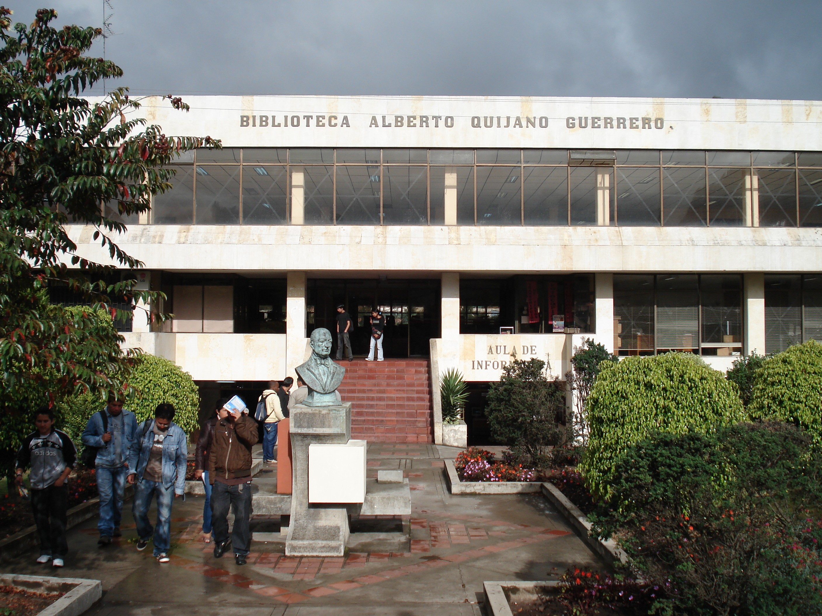 Biblioteca Alberto Quijano Guerrero, Universidad de Nariño, Pasto.